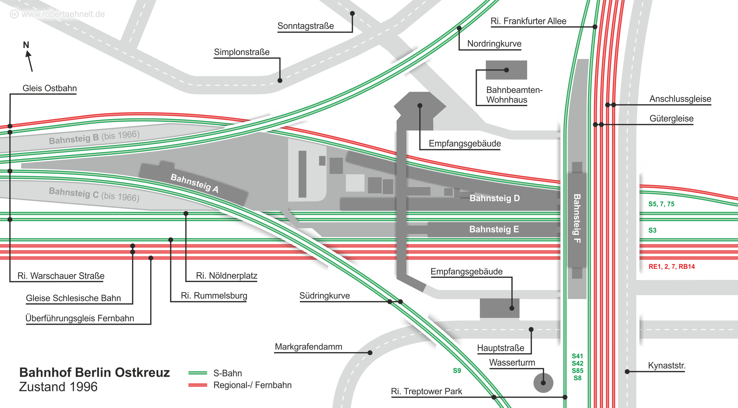 Bahnhof Berlin Ostkreuz - Zustand 1996